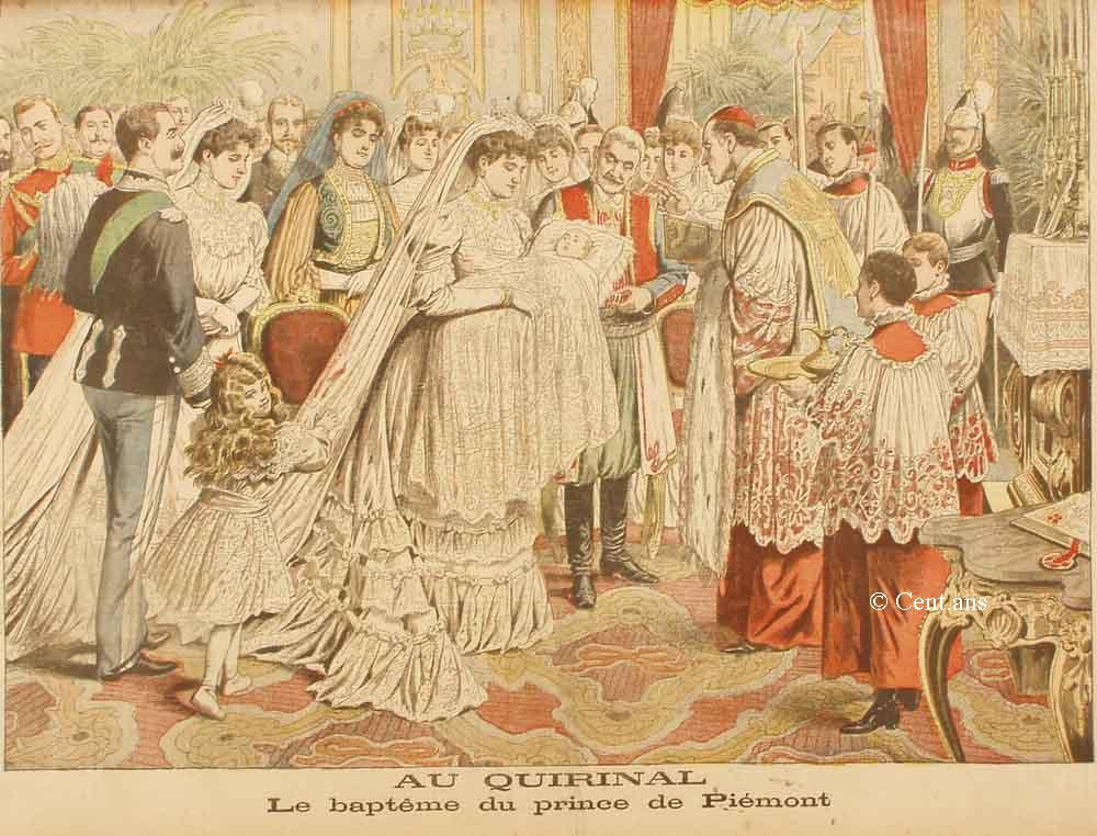 Le baptême du prince de Piémont